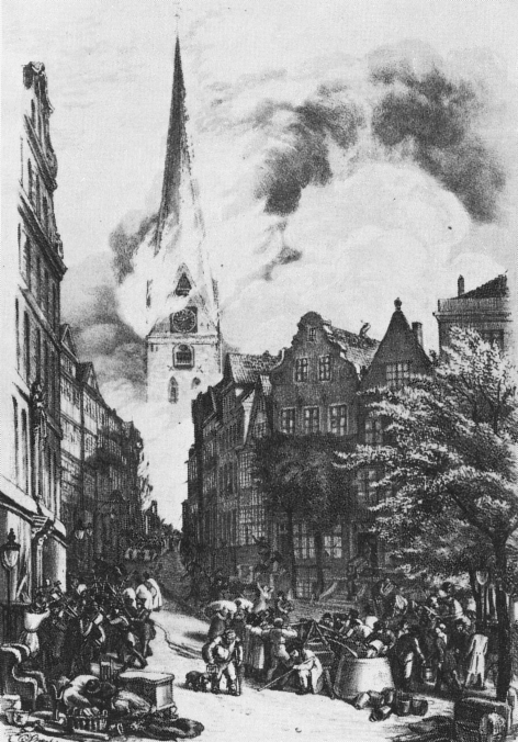 Hamburg: Brennende Petrikirche am 7. Mai 1842, vom Fischmarkt aus gesehen. Originaltitel: "St. Petri am 7. Mai 1842 morgens gegen 10 Uhr vom Fischmarkt." Lithographie von Otto Speckter.This is a photograph of an architectural monument.